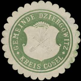 Sealing stamp Title: Gemeinde Dziergowitz Kreis Kosel/Oppeln Description: Cosel, grün, weiß, geprägt Place: Dziergowitz size: 4 cm